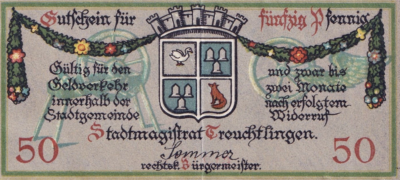 Notgeldschein Treuchtlingen (1918) mit Unterschrift von Bürgermeister Emil Sommer (+ 1936). Emil Sommer war ein Sohn aus der Grünstadter Druckerei Sommer.